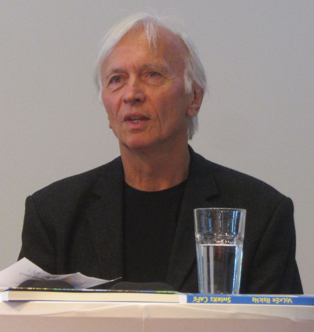 Comic-Zeichner Volker Reiche am FAZ-Stand auf der Frankfurter Buchmesse 2014 (vor ihm auf dem Tisch liegt sein Comic-Band Snirks Café - Das Voodoohuhn von Curaçao [Suhrkamp Verlag])